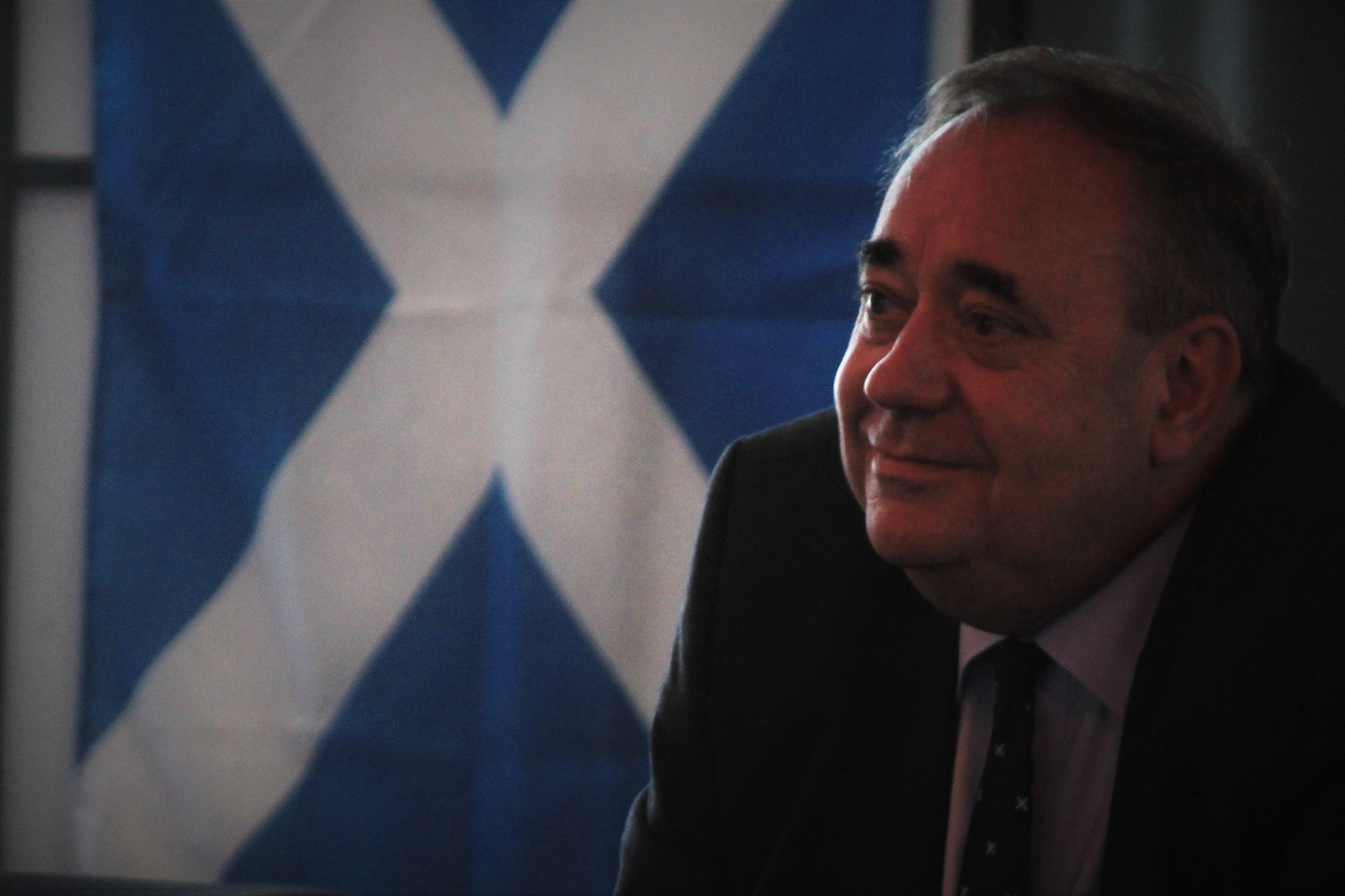 Conférence d'Alex Salmond lors du festival interceltique de Lorient 2017.